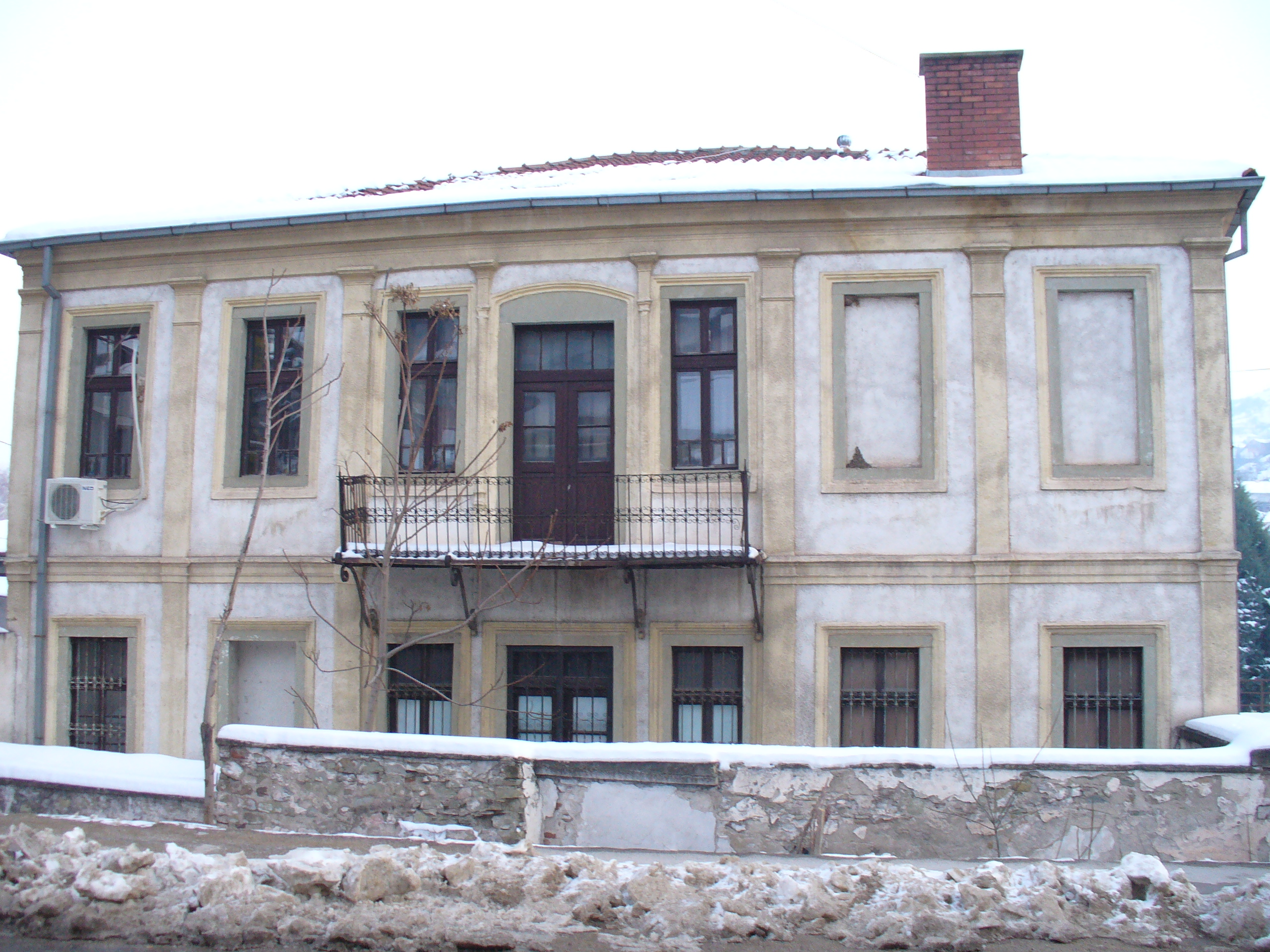 Стара къща в Щип, Република Македония.